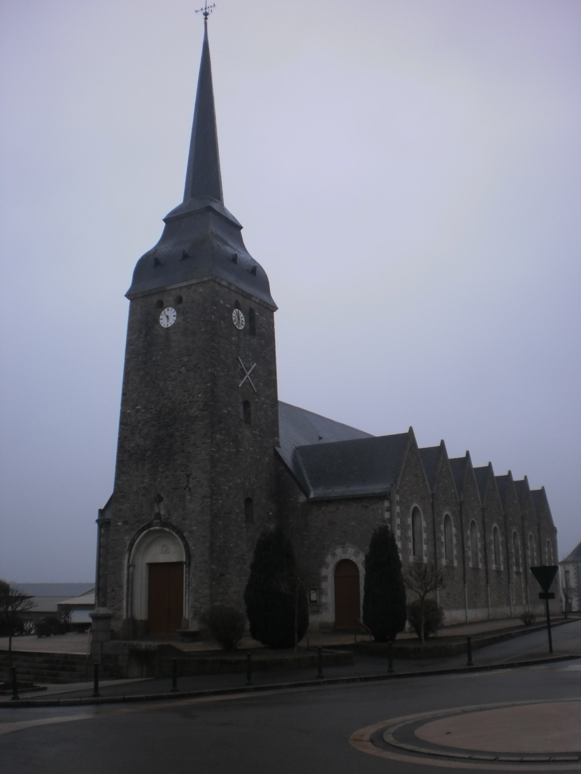 Maumusson - Loire-Atlantique (France) - L'église